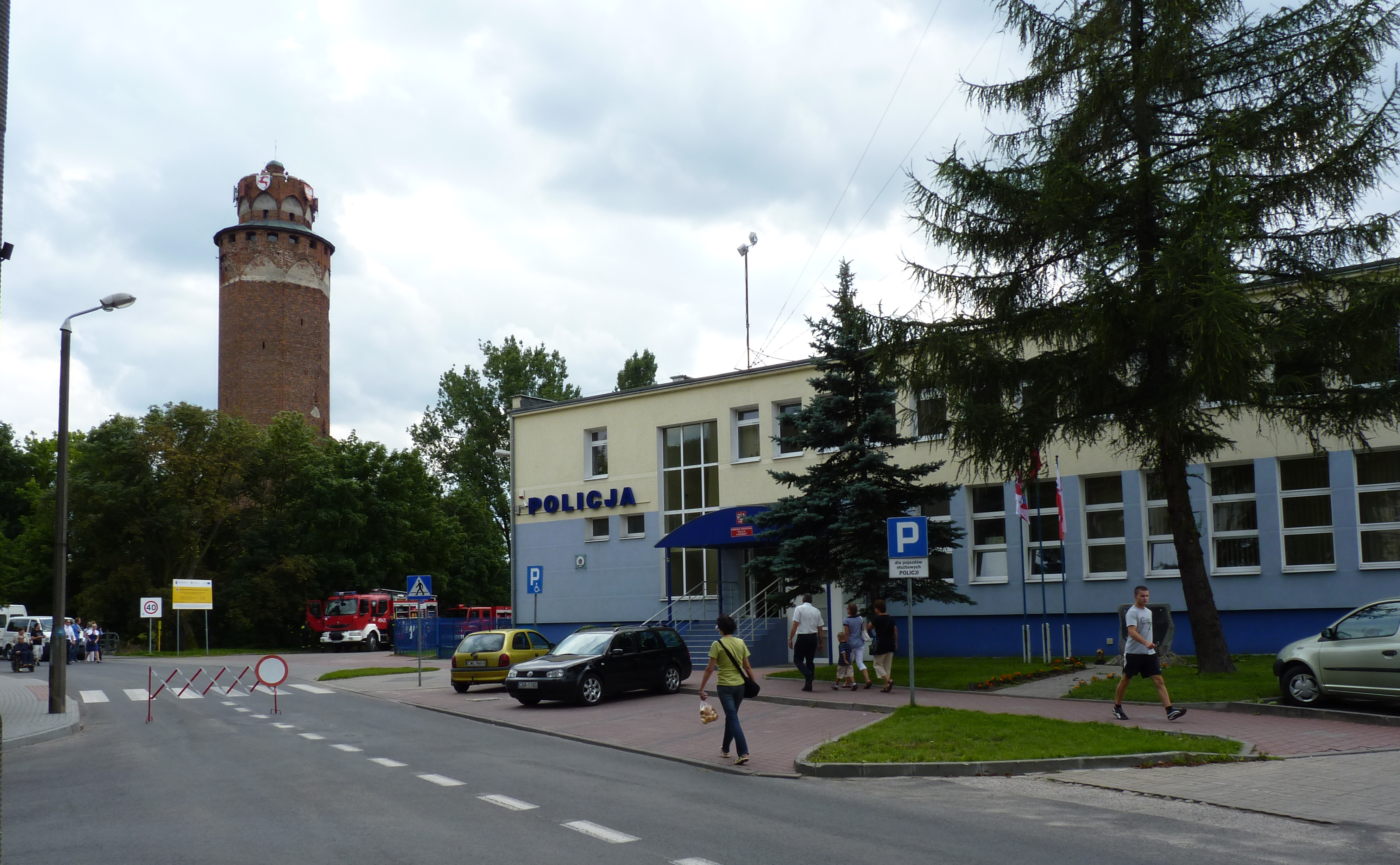 Brodnica w głębi widoczna wieża dawnego zamku